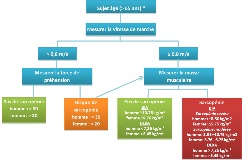 Les comorbidités et circonstances individuelles expliquant chaque résultat doivent être considérées. Cet algorithme peut également être appliqué aux personnes plus jeunes à risque de sarcopénie.